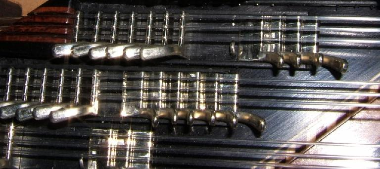 Leviers d'un qanoun Turc.